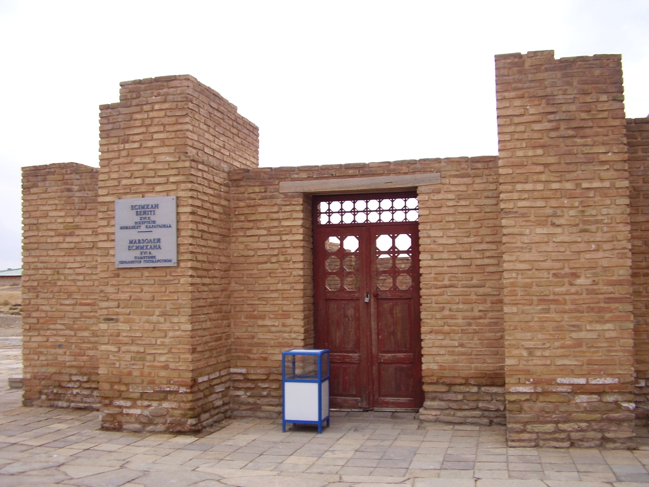 Мавзолей Есимхана. Расположен в 12 м к югу от западного минарета ханаки Ахмеда Ясави. Город Туркестан, Казахстан.